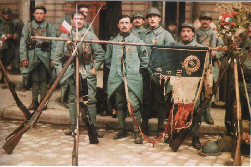 Autochrome original du commandant Tournassou représentant le drapeau du 66e RI et de sa garde vers 1918.